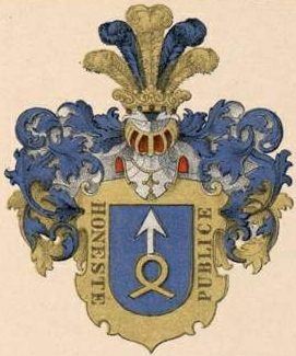 Novosiltsovi suguvõsa aadlivapp